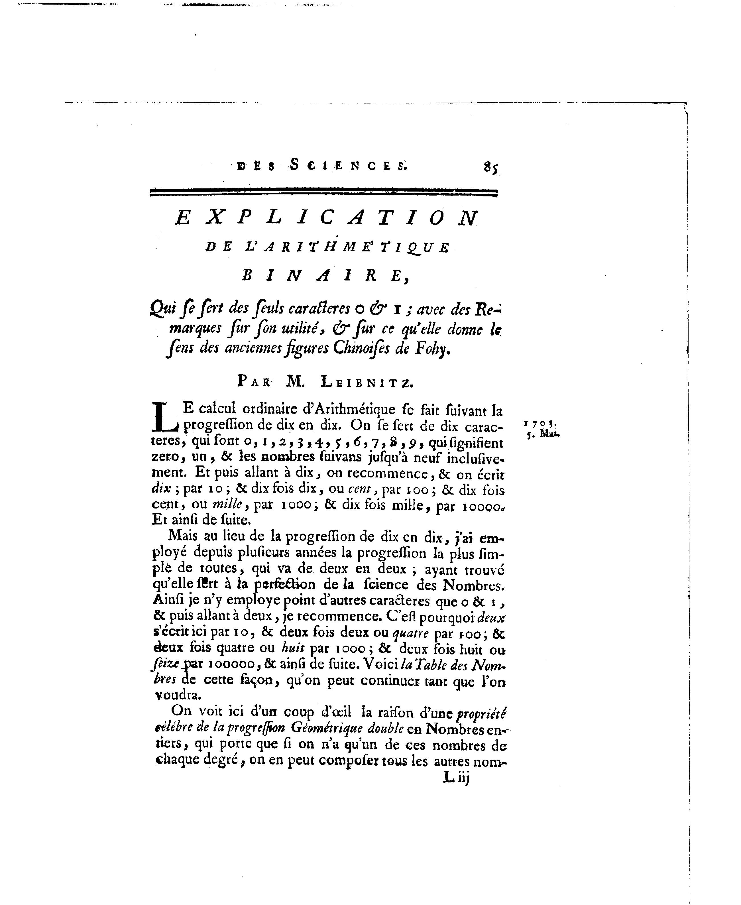 一张封面图片